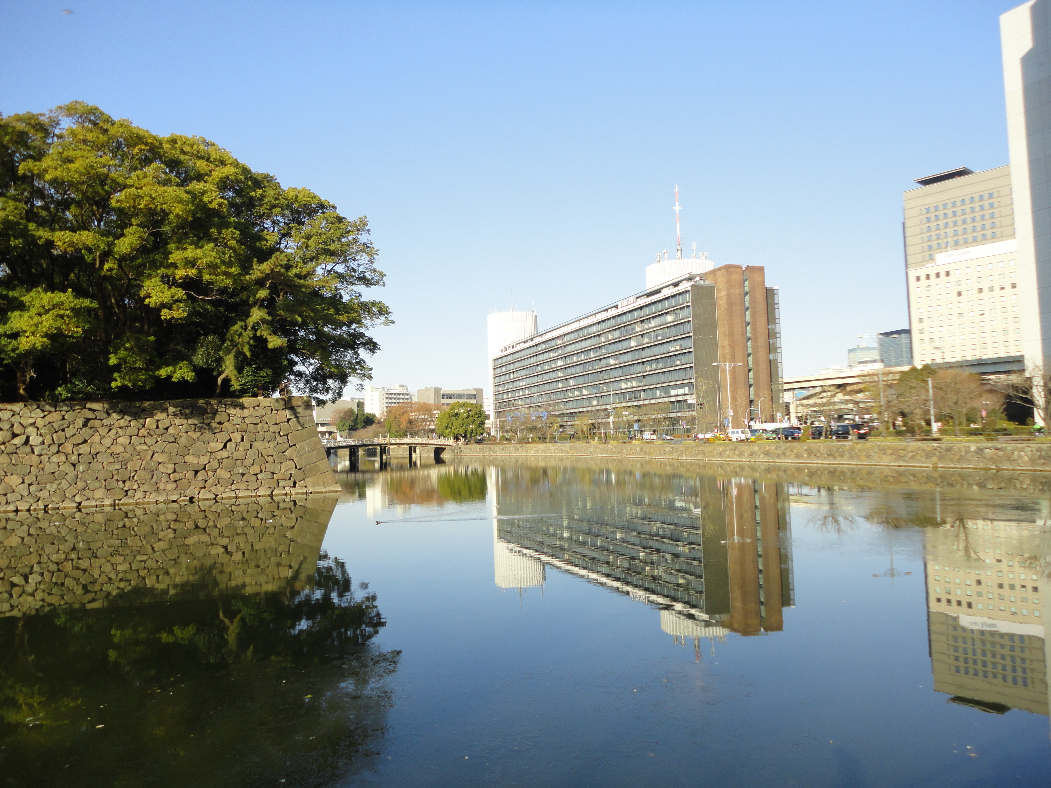 気象庁前